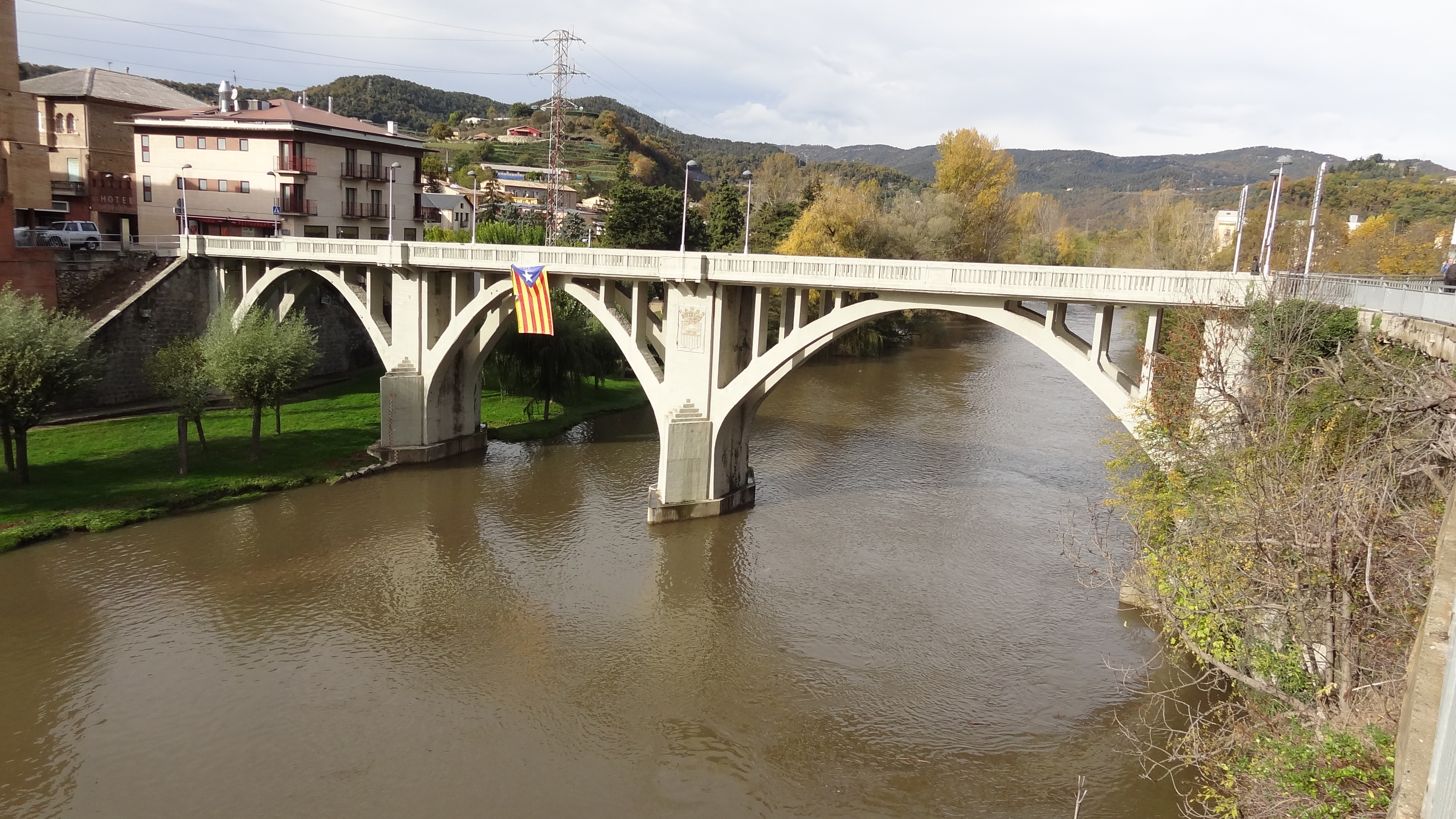 Sant Quirze de Basora. Osona. Catalonian flags